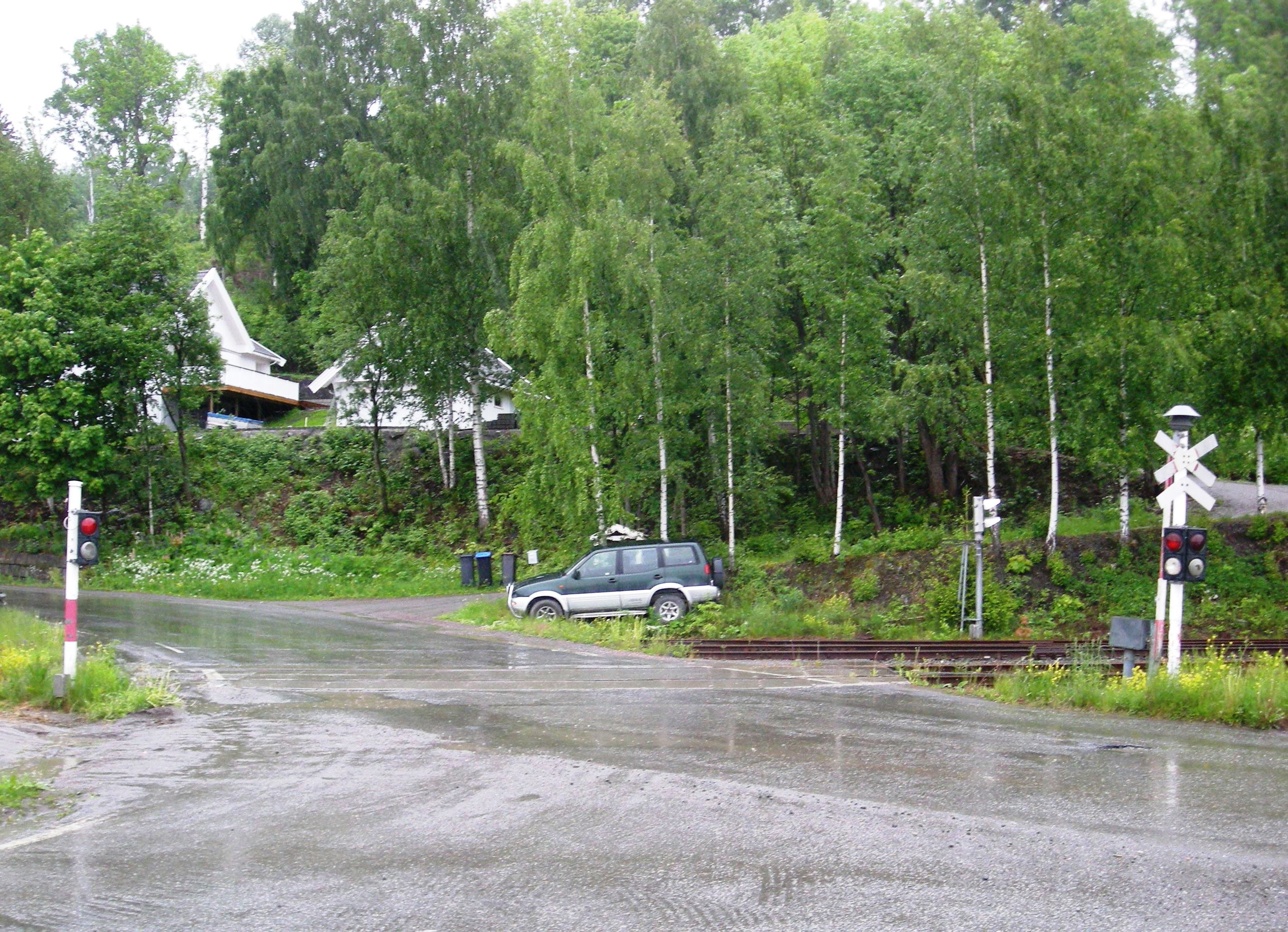 Fylkesvei 247 krysser Valdresbanen ved Hov stasjon.